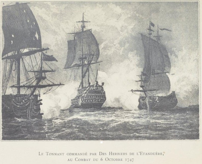 Le Tonnant, 80 canons, attaqué par deux vaisseaux anglais à la bataille du cap Finisterre, octobre 1747, guerre de Succession d'Autriche.